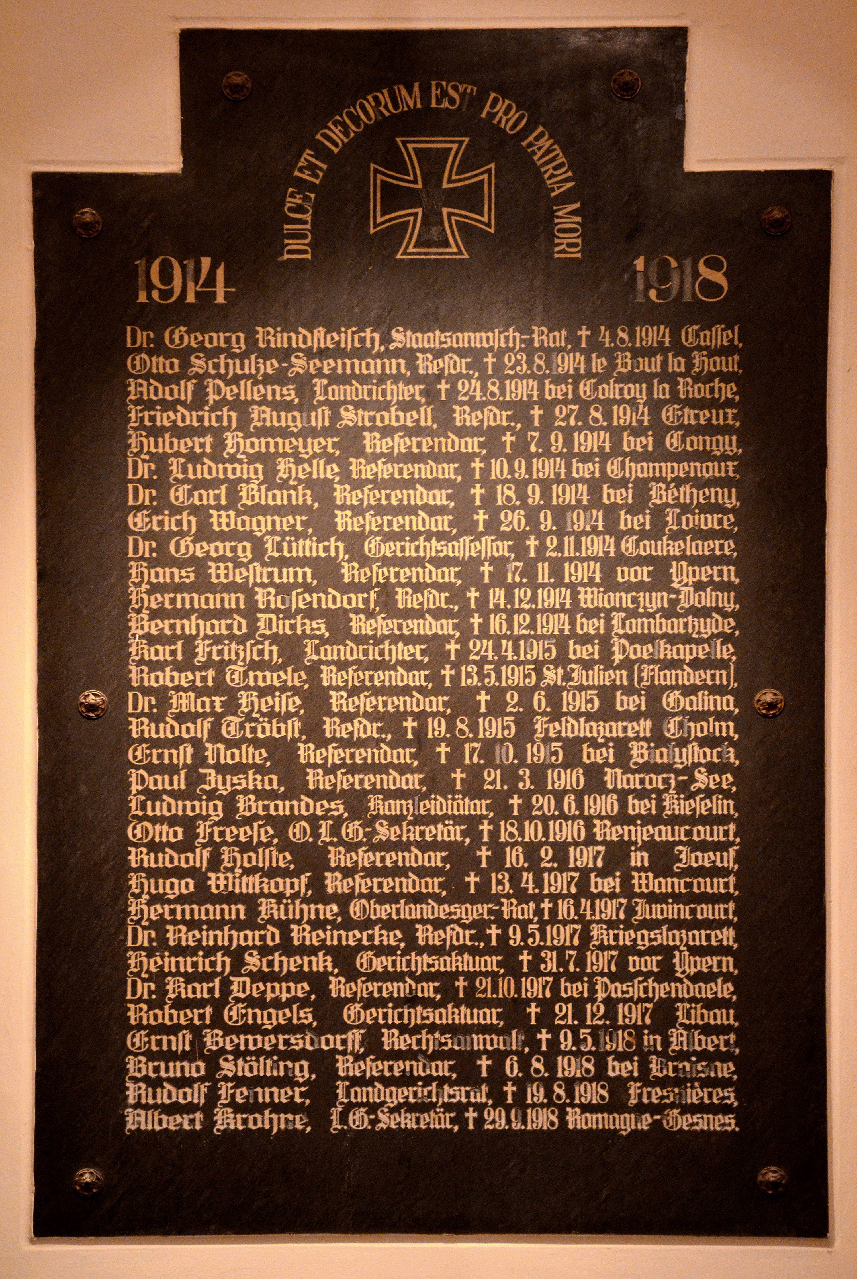 Im Haupttreppenhaus des 1842 und 1843 übergebenen Gebäudes des (heutigen) Oberlandesgerichts Celle wurde eine Gedenktafel für die im Ersten Weltkrieg Gefallenen angebracht, die heute (Stand 2015) zwischen Ölgemälden mit den Porträts ehemaliger Präsidenten installiert ist. Unter einem Eisernen Kreuz mit dem angedeuteten Buchstaben W für den deutschen Kaiser Wilhelm II. und der Jahreszahl 1914 sowie der darüber im Halbrund eingravierten Inschrift „Dulce et decorum est pro patria“ finden sich Vor- und Zunamen, Funktion, Todesdaten und Sterbeort ausgewählter zum Krieg Einberufener. Eine ähnliche Ehrung für die im Zweiten Weltkrieg Umgekommenen scheint es hingegen nicht zu geben. Die Namen auf der hier installierten Schiefertafel lauten: „Dr. Georg Rindfleisch, Staatsanwsch.-Rat, † 4.8.1914, Cassel, ...“ ...